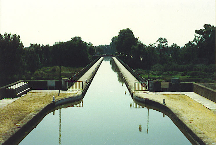 propre photo